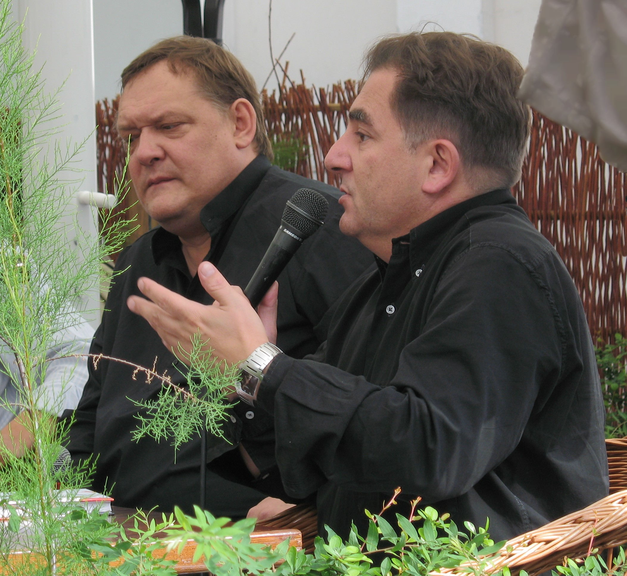 Piotr Bikont i Makłowicz w Restauracji Nalewka na Starym Rynku w Poznaniu, czerwiec 2007